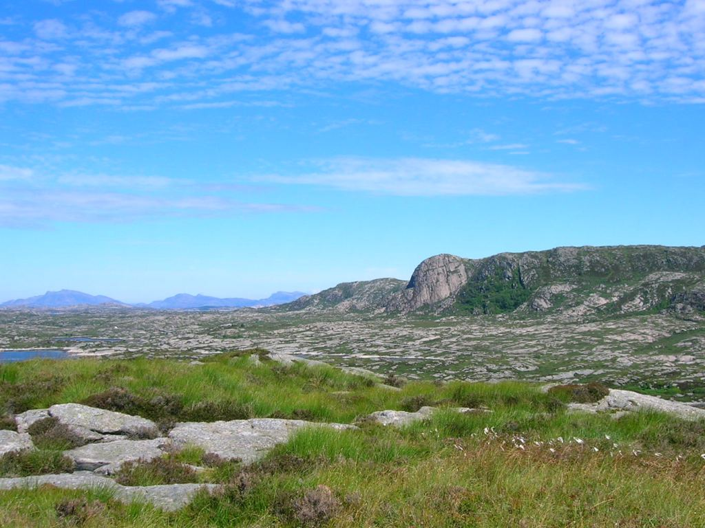 Byrknesøy in Gulen, Norway. Picture taken 2006-07-18 by Gunnar Buvik